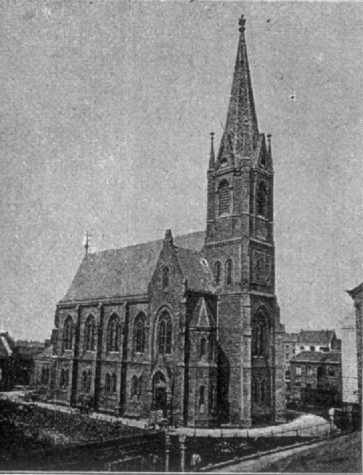 Presbyterkirche Köln-Kalk